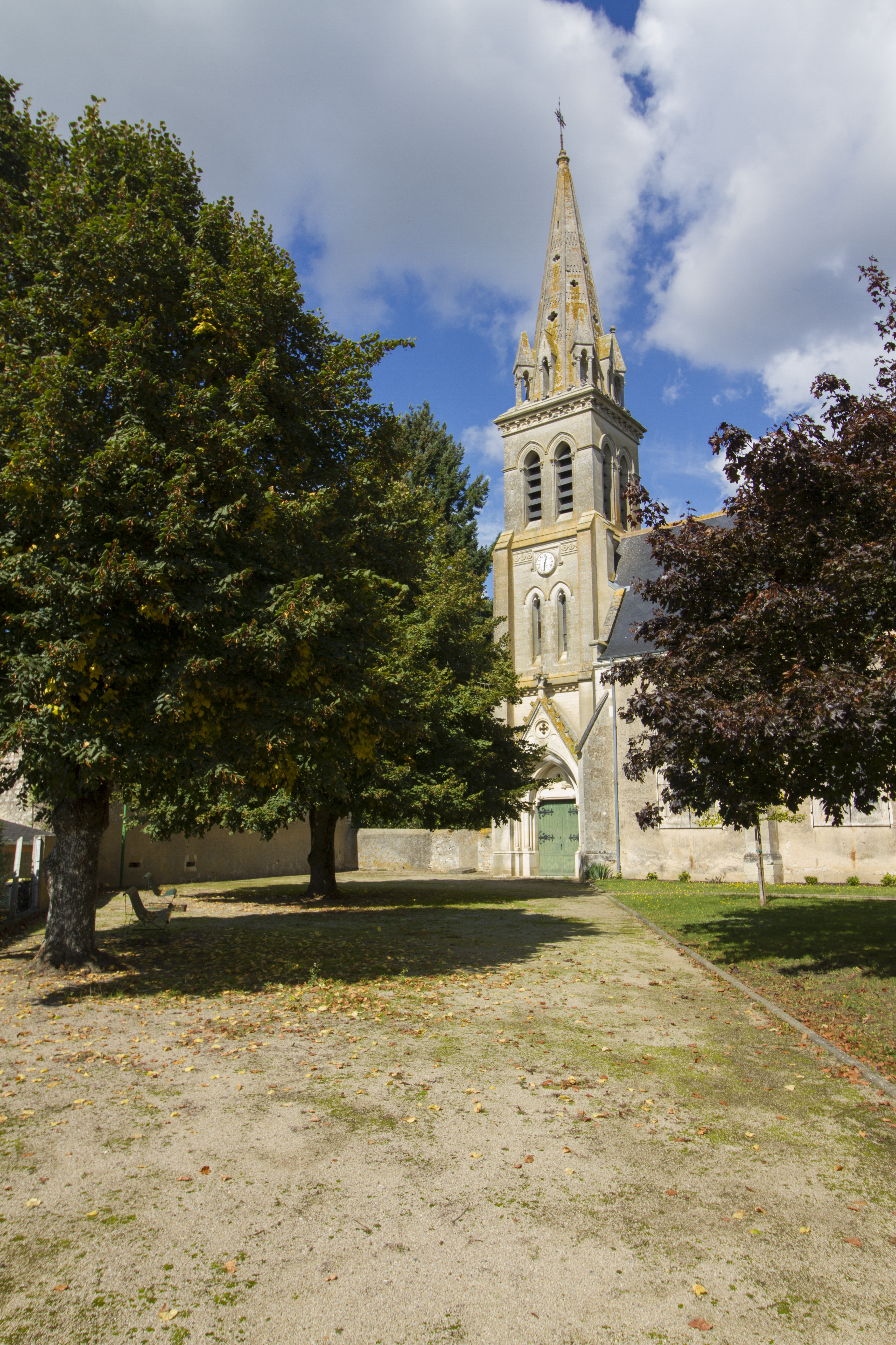 Eglise de Nogent-sur-Loir - Sarthe